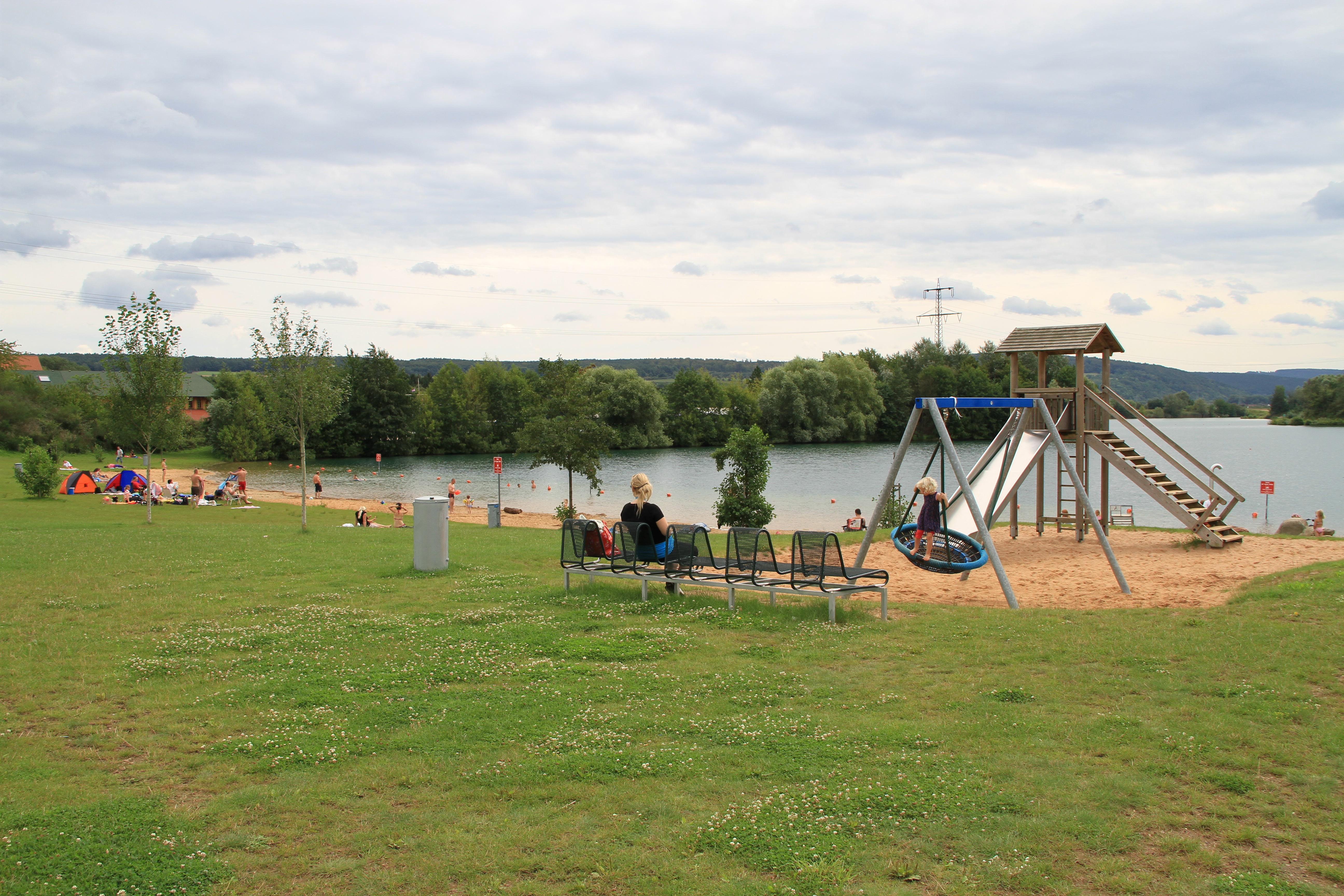 Badestrand "HonischBeach" in Niedernberg, Bayern, Deutschland